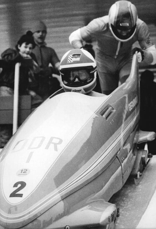 Wolfgang Hoppe, Dietmar Schauerhammer ADN-ZB Schaar 11.3.85-St.-Oberhof: DDR-Meisterschaften im Zweierbob-Die Olympiasieger und Weltmeister Wolfgang Hoppe und Dietmar Schauerhammer (ASK Oberhof) übernahmen am ersten Tag der zum 12. Mal auf der Oberhofer Kunsteisbahn ausgetragenen DDR-Meisterschaft im Zweier-Bob die Führung (hier beim Start).